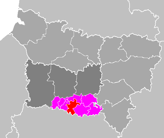 Maps of arrondissements and cantons of France: Département de l'Oise